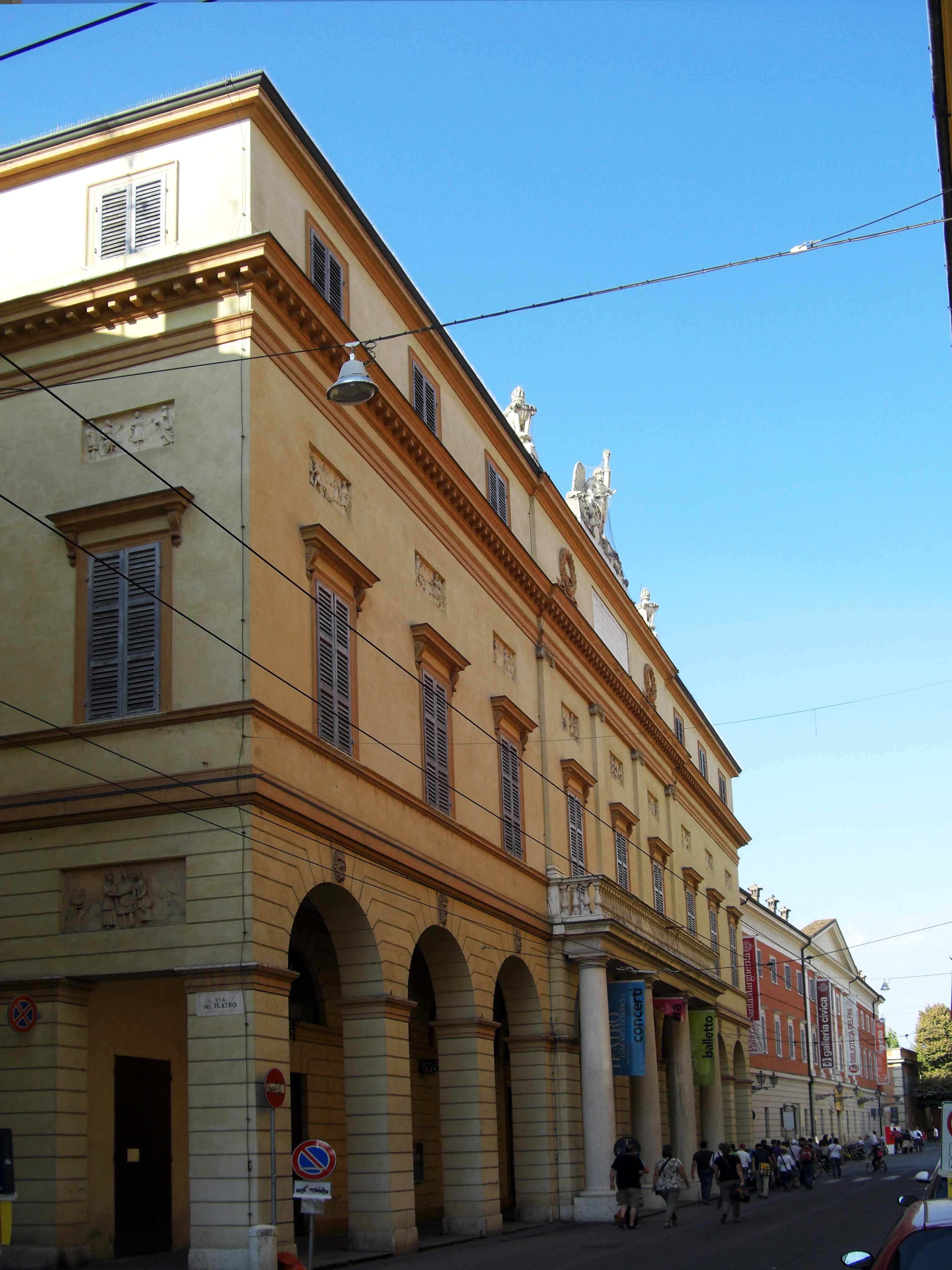 Teatro Comunale This is a photo of a monument which is part of cultural heritage of Italy.